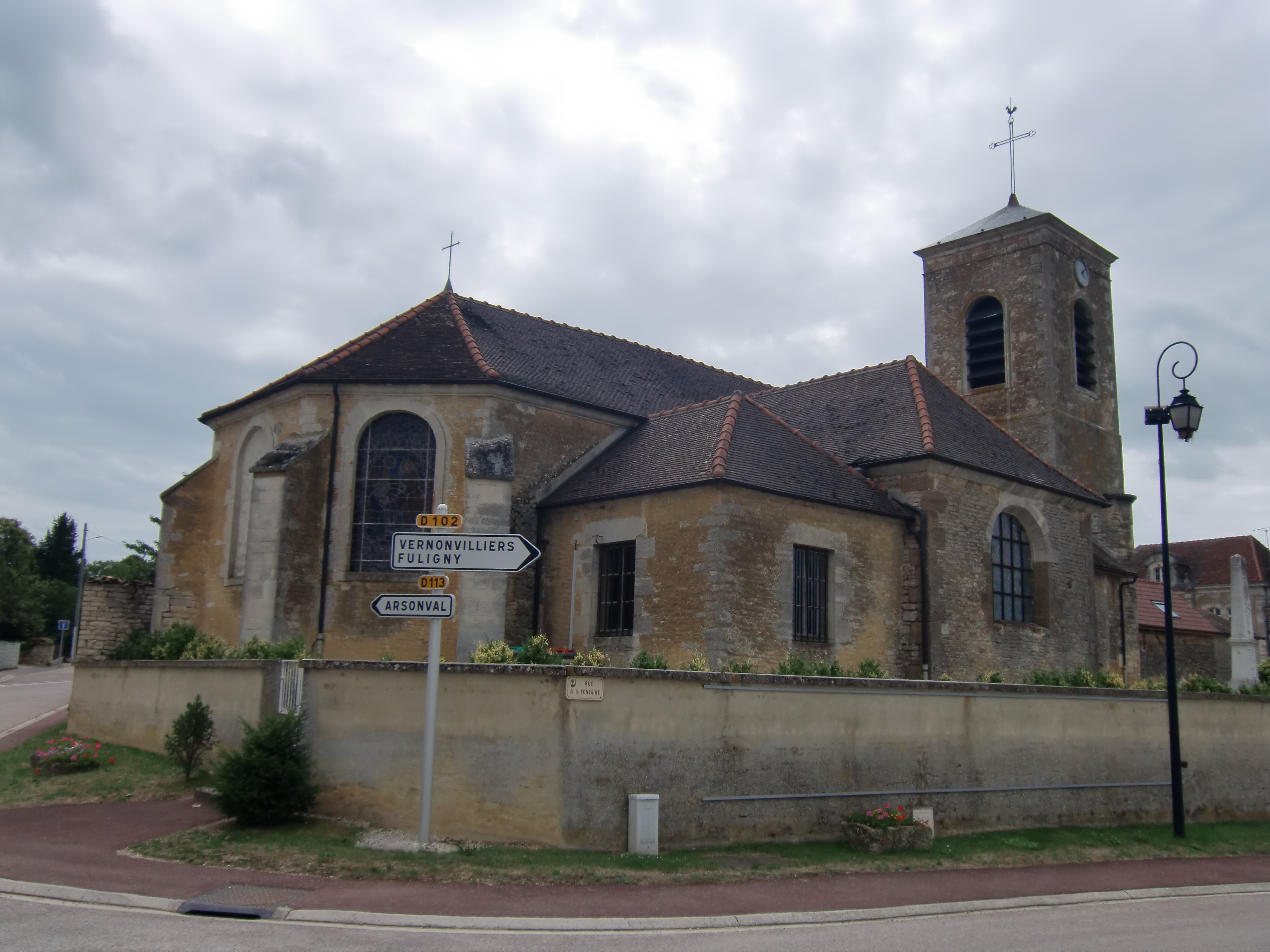 église de Lévigny (Aube, Champagne, France)